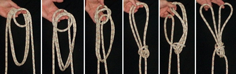 nœud d'arabesque double + clef